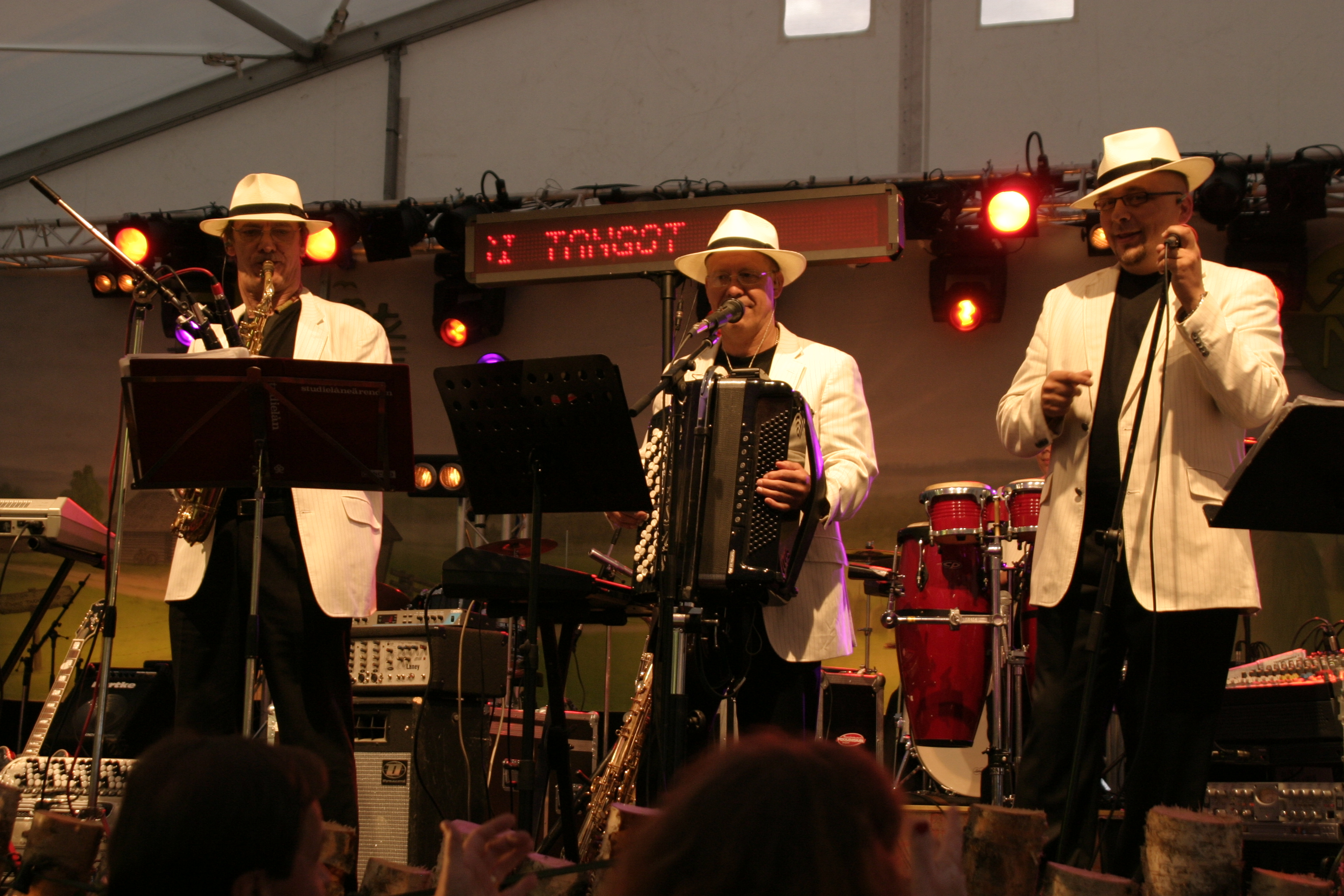 Pekkaniskan tanssiorkesteri Kiuruvedellä Iskelmän juhlaa 10 vuotta musiikkitapahtumassa 17.7.2008.